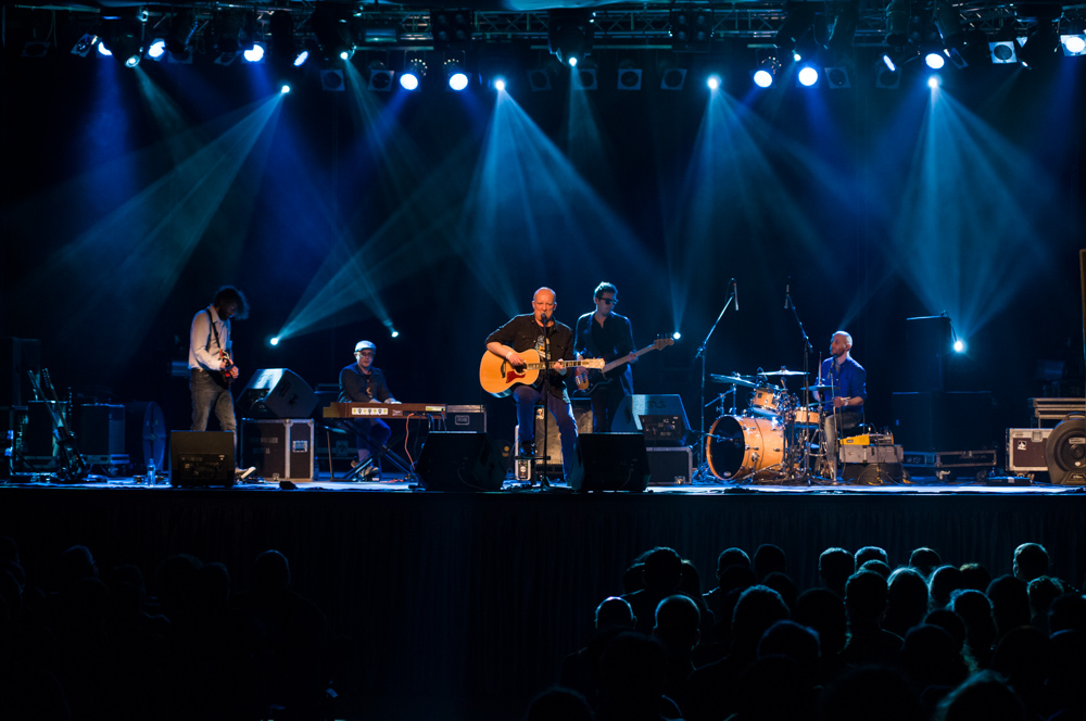 Koncert zespołu Piotr Bukartyk i Szałbydałci, 20 marca 2013, Klub Stodoła, Warszawa.